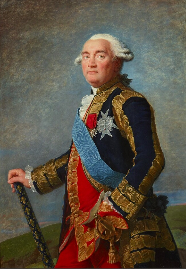 Philippe Henri, marquis de Ségur-Ponchat (1724–1801), französischer Marschall und Kriegsministertitle QS:P1476,de:"Philippe Henri, marquis de Ségur-Ponchat (1724–1801), französischer Marschall und Kriegsminister" label QS:Lde,"Philippe Henri, marquis de Ségur-Ponchat (1724–1801), französischer Marschall und Kriegsminister"